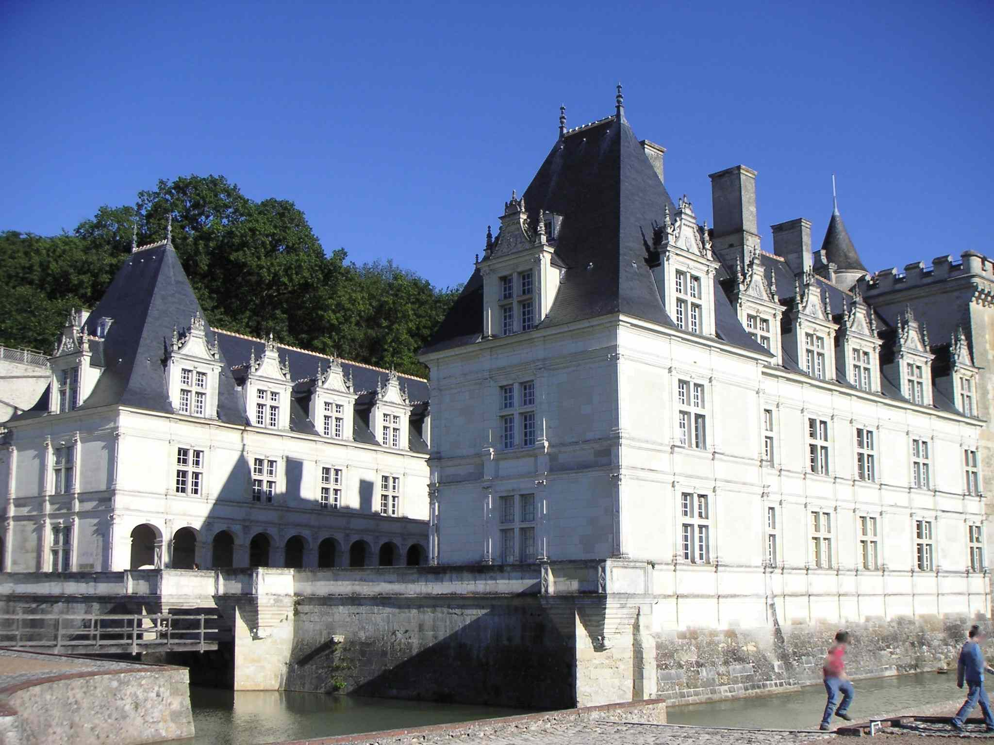 Vue des deux ailes du château de Villandry (France)